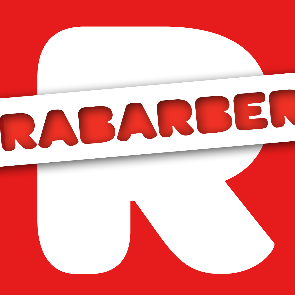 Avatar van Rabarber